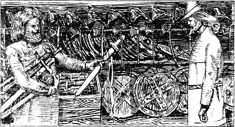 Christian Krohg: Illustration for Olav den helliges saga, Heimskringla 1899-edition. nn: «Kong Olav gjev Sigvat skald eit sverd.»